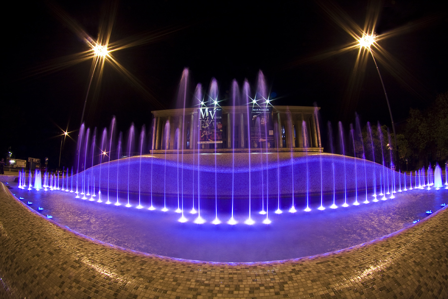 Fontanna przy pl. Dąbrowskiego